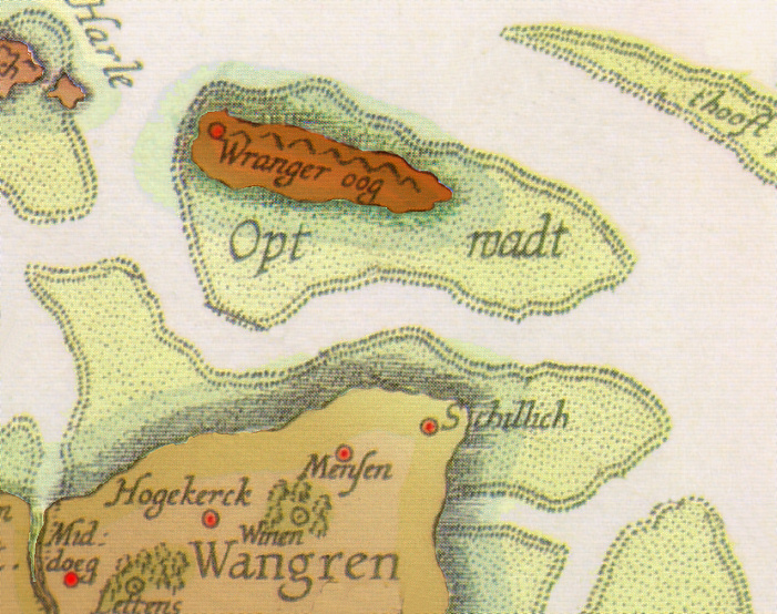 Wangerooge auf historischer Karte im 16. Jahrhundert